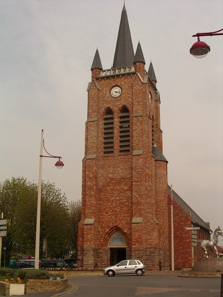 Eglise Saint Vaast Fouquières les Lens